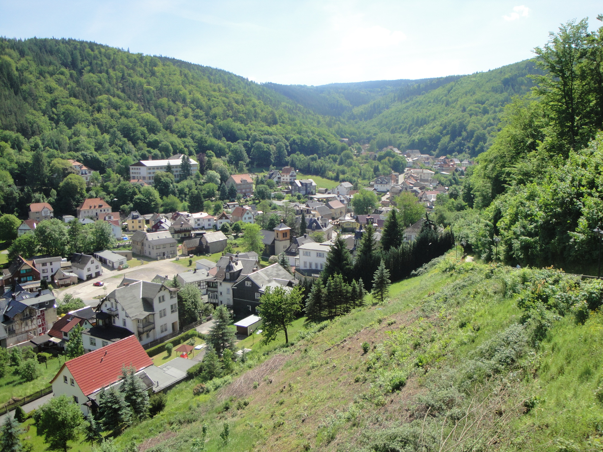 Talblick Schwarzburg vom oberen Dorf auf das untere Dorf, Pfingsten 2012